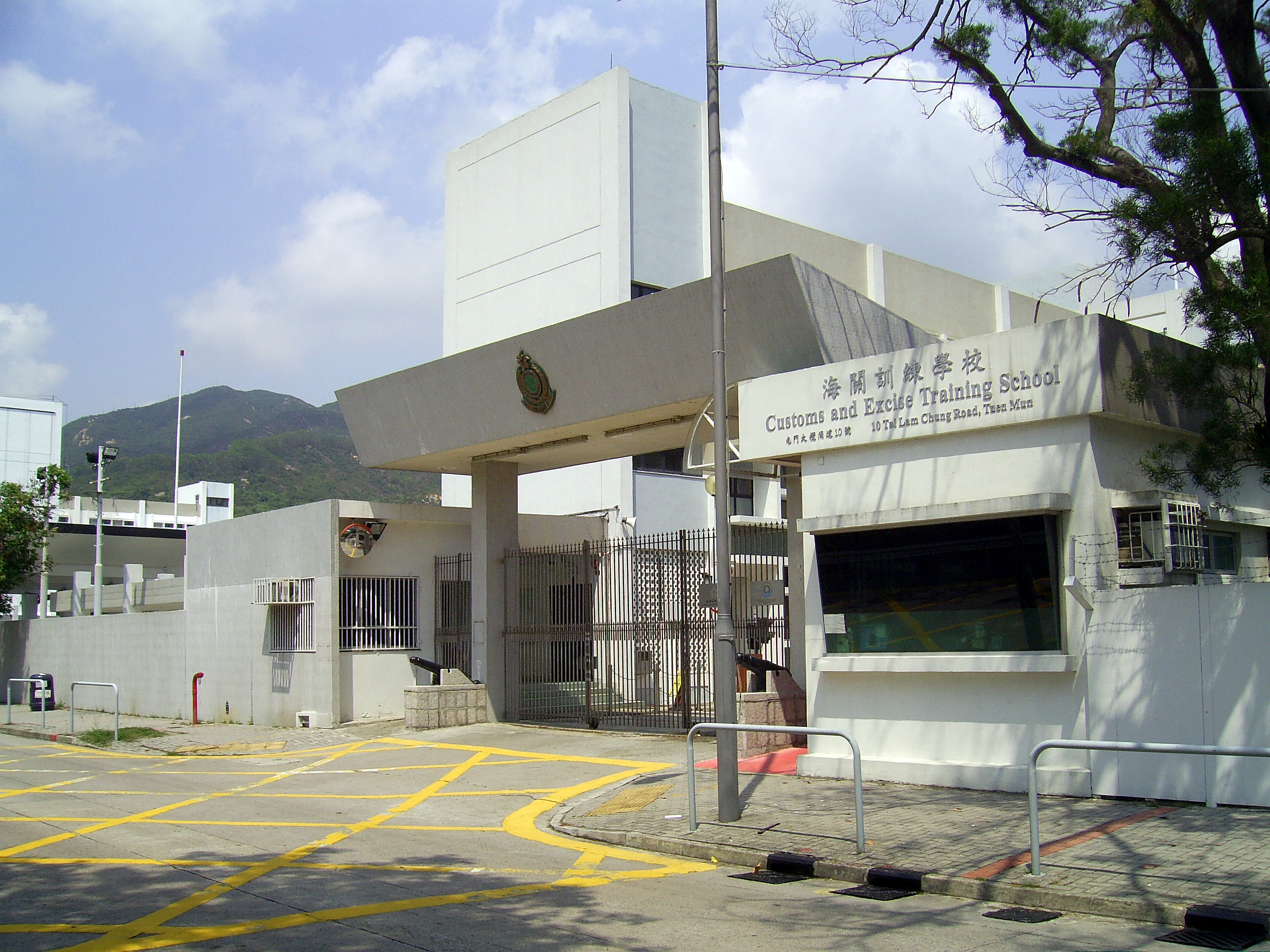 中文（香港）: 海關訓練學校